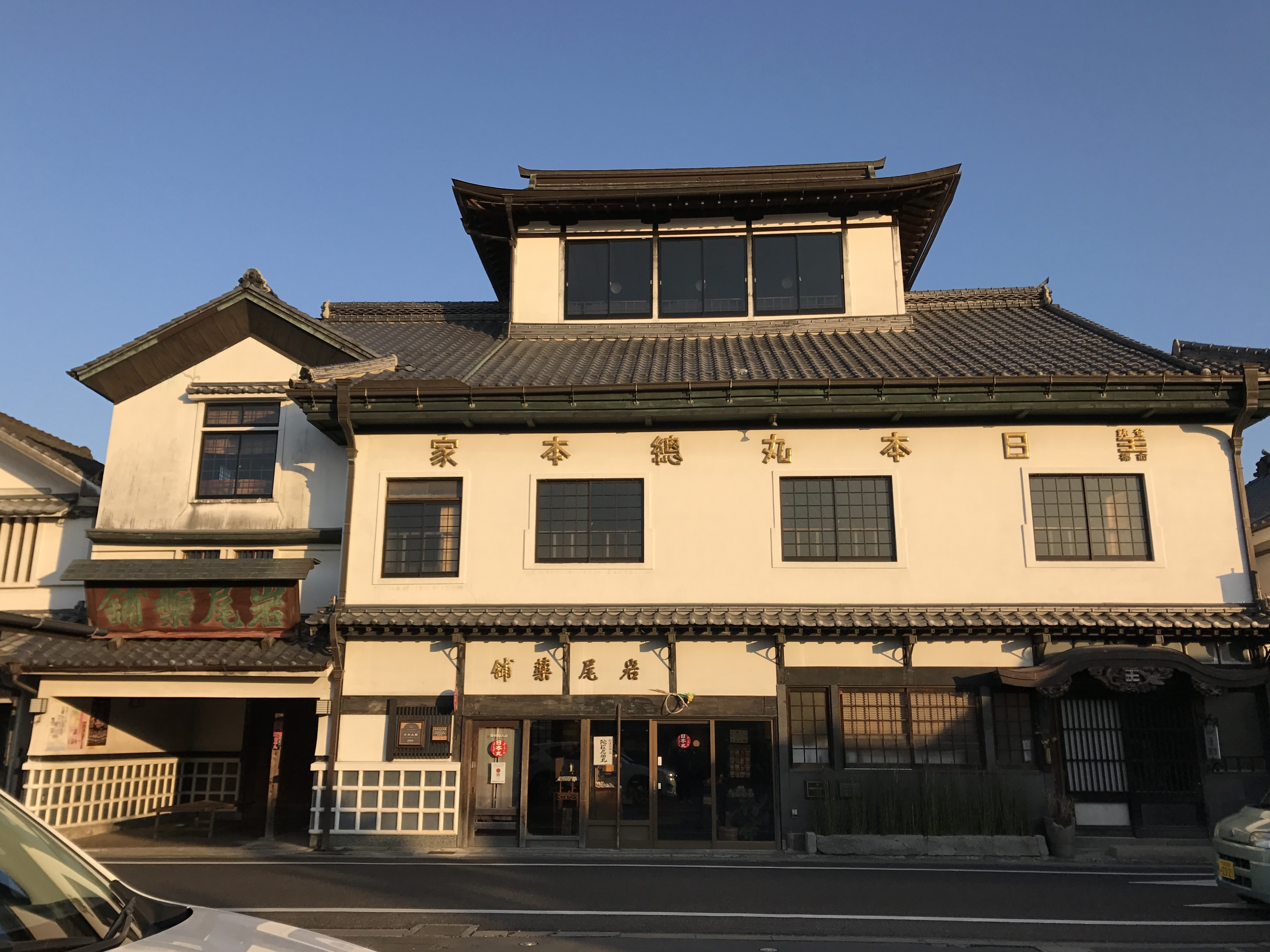 豆田町・日本丸館(岩尾薬舗)